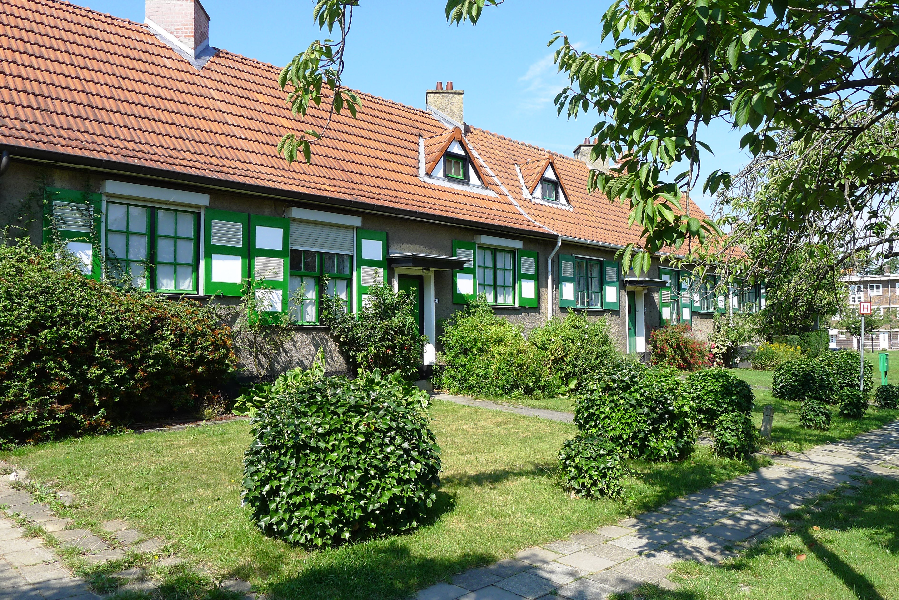 Cité-jardin Le Logis